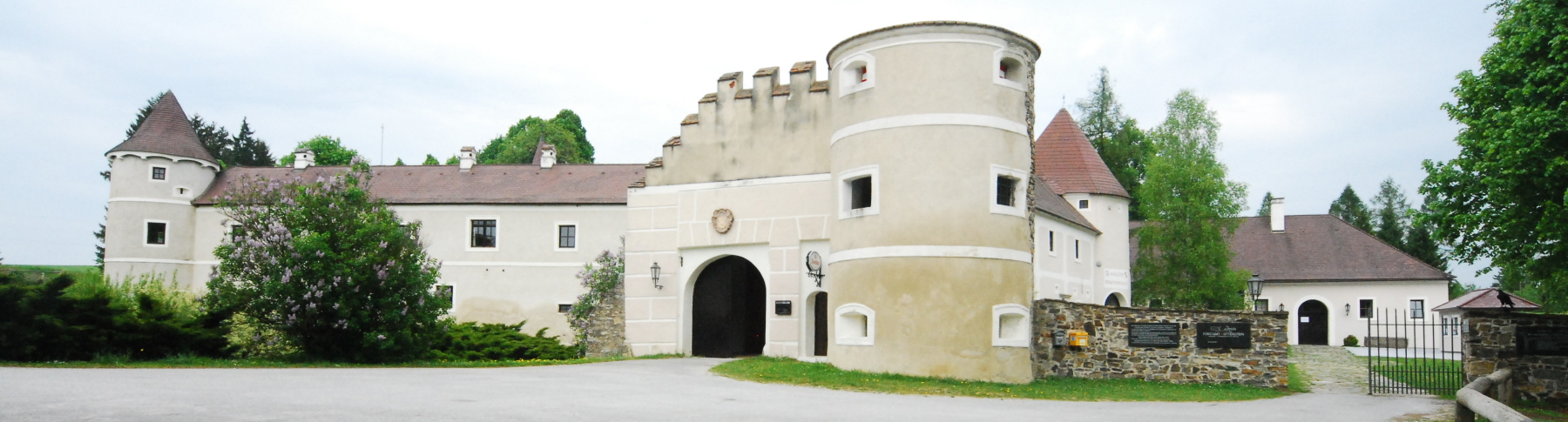 Schloss Waldreichs in Niederösterreich